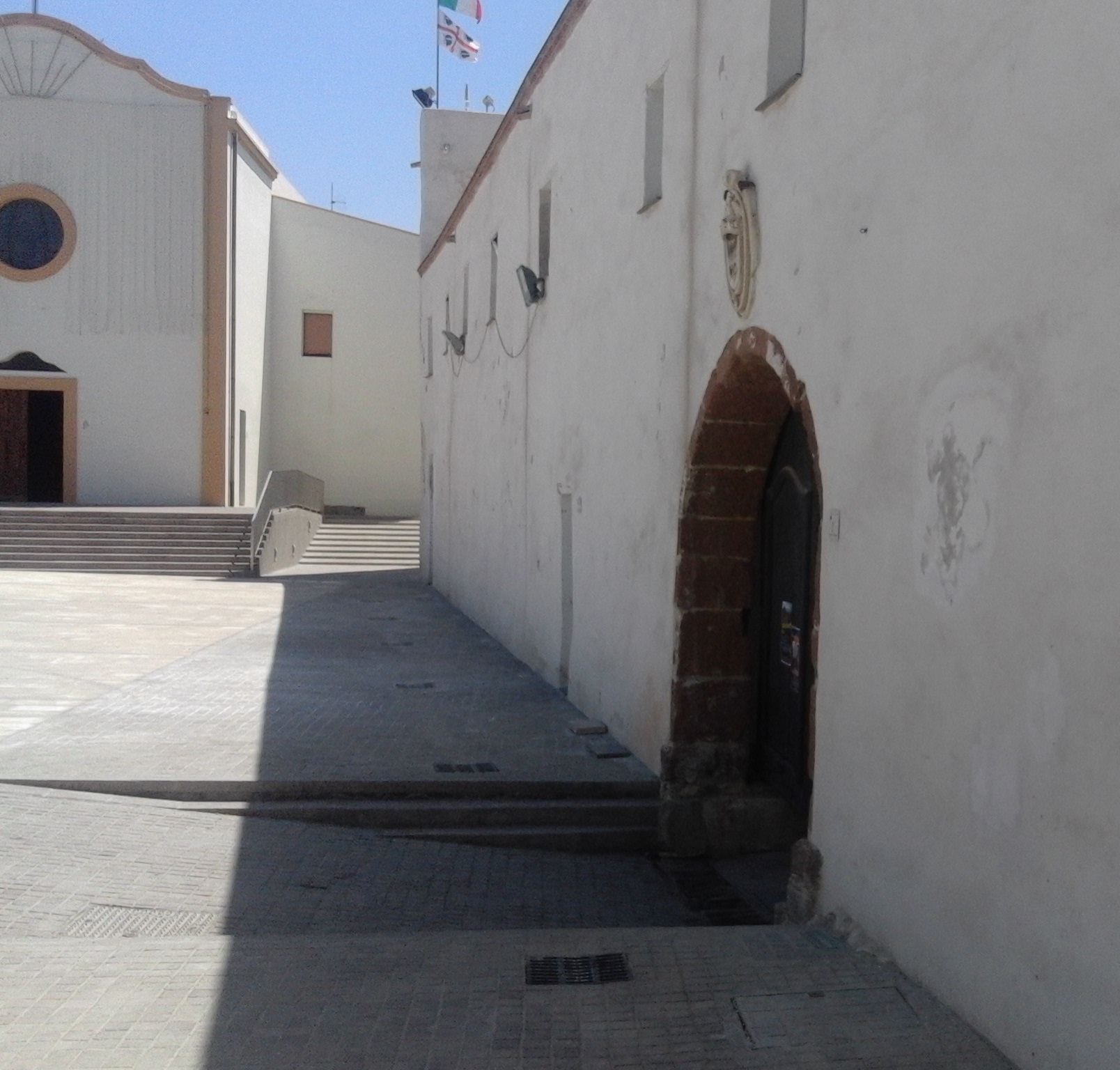 Su Pranu, Portoscuso